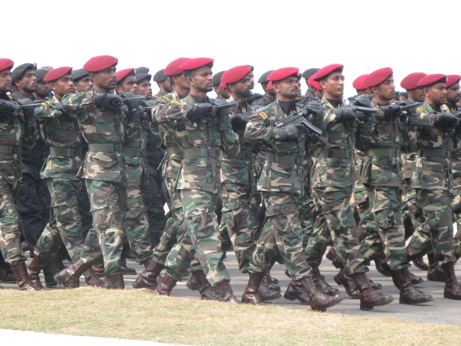 Commandos - Sri Lanka Army